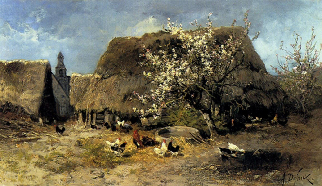 Paysage